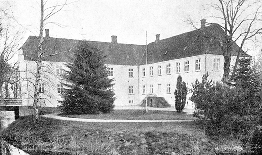 Hellerup er en gammel hovedgård, som nævnes første gang i 1400. Hellerup er nu en avlsgård under Ravnholt Gods. Gården ligger i Hellerup Sogn, Vindinge Herred, Ringe Kommune. Hovedbygningen er opført i 1670 og tilbygget i 1804 og parken er på 6 hektar. Hellerup Kirke er nabo til herregården.